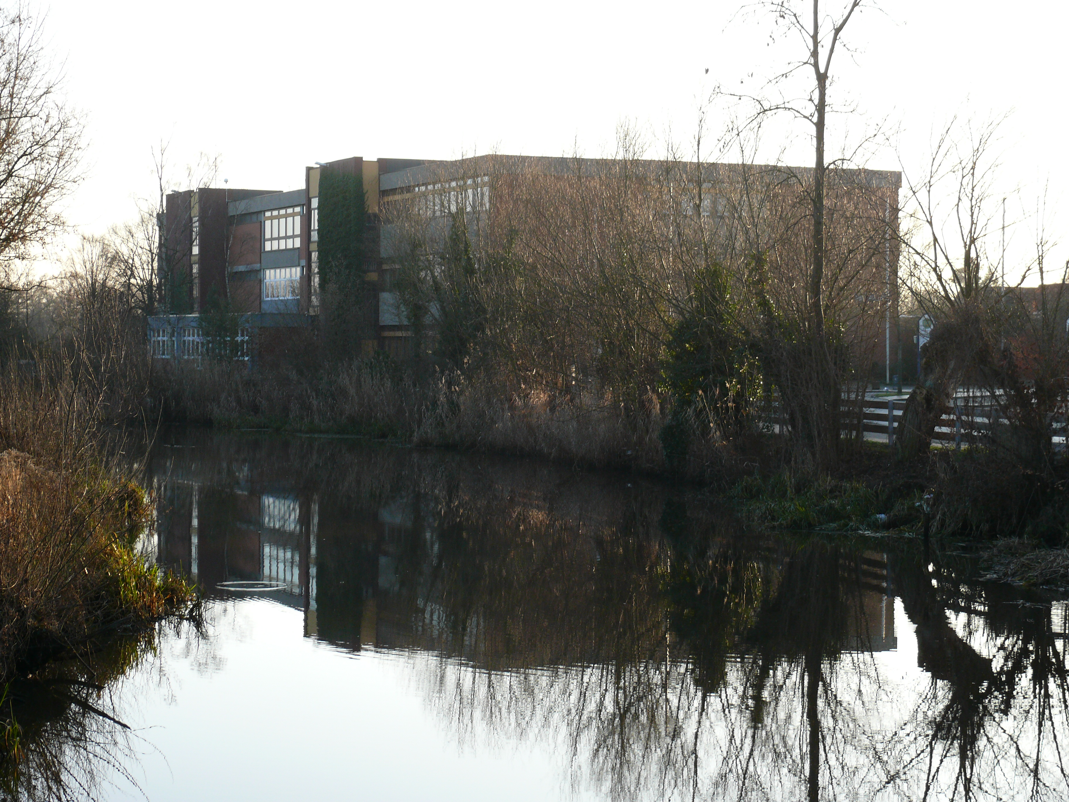 Gebäude der Nicolas-Born-Schule (hier an der Alten Jeetzel) in Dannenberg (Elbe).